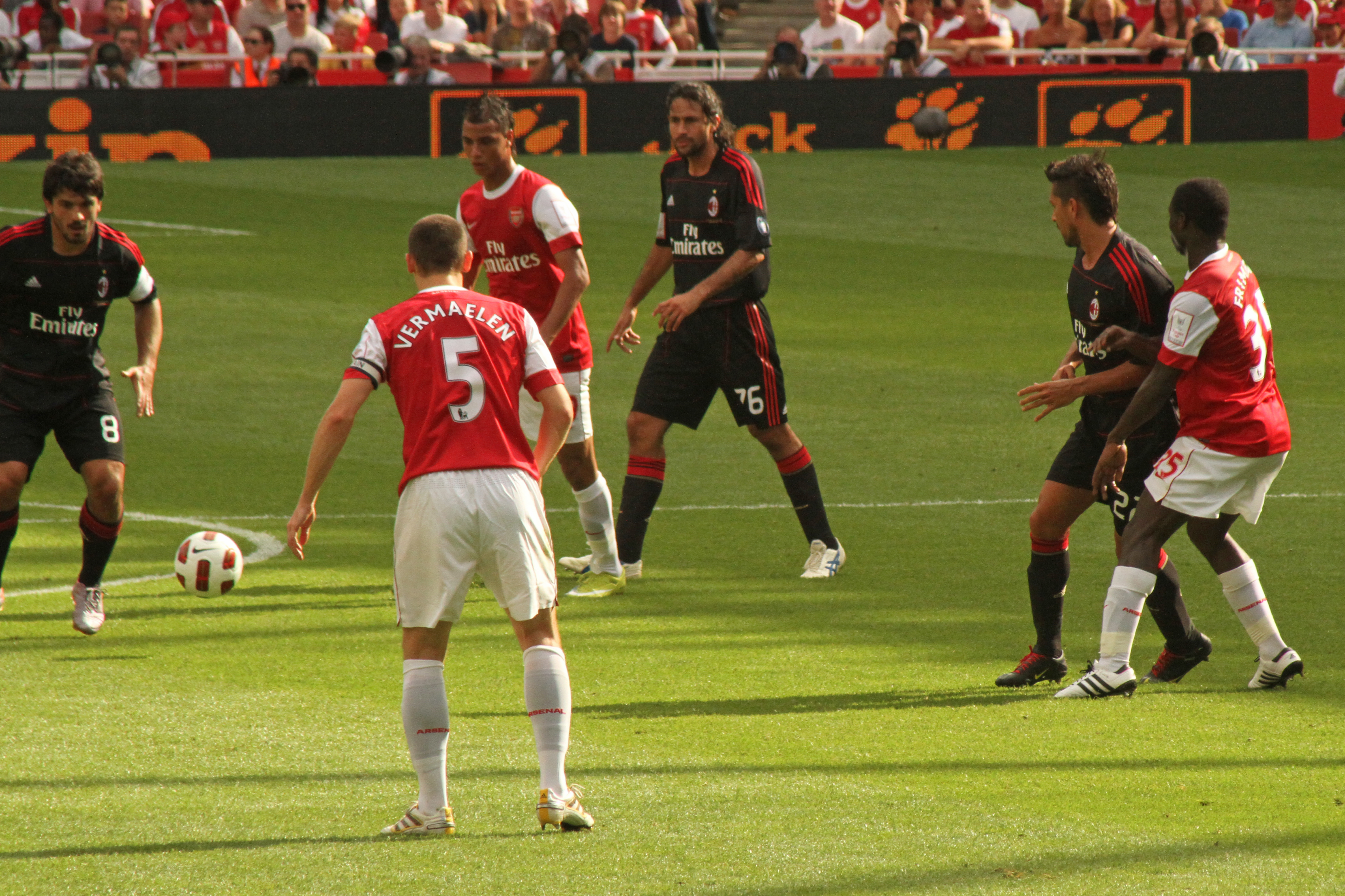 Gennaro Gattuso, Thomas Vermaelen, Lauren Koscielny, Mario Yepes, Marco Borriello & Emmanuel Frimpong